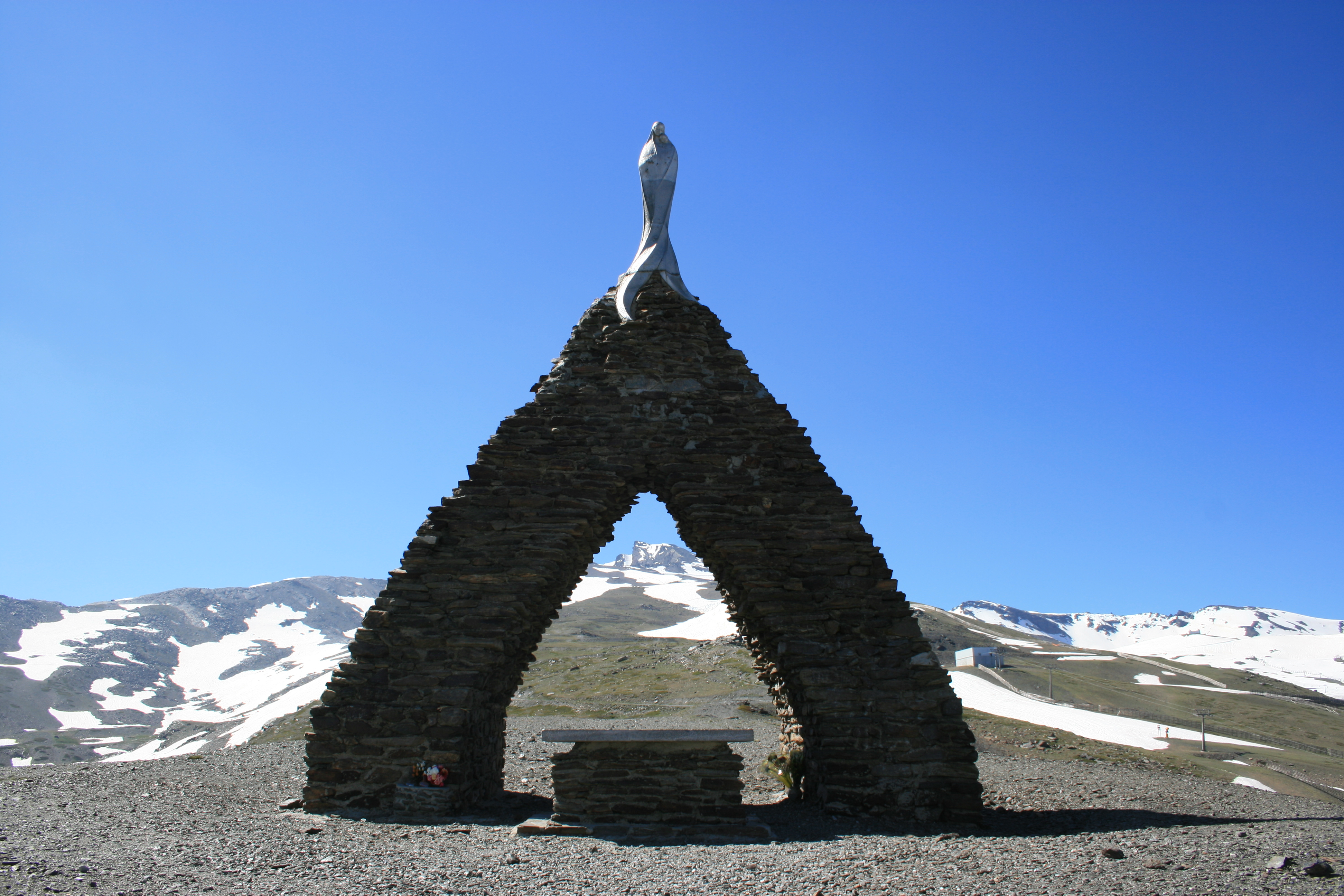 Monumento a la Virgen de las Nieves en Sierra Nevada (España).